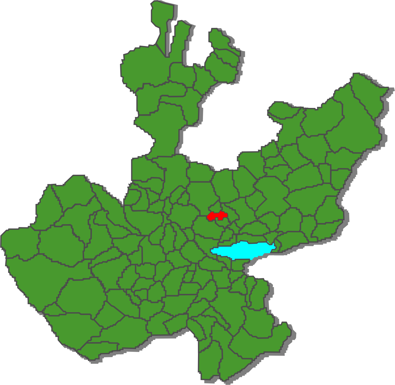 Mapa de ubicación del municipio de Tlaquepaque en Jalisco.